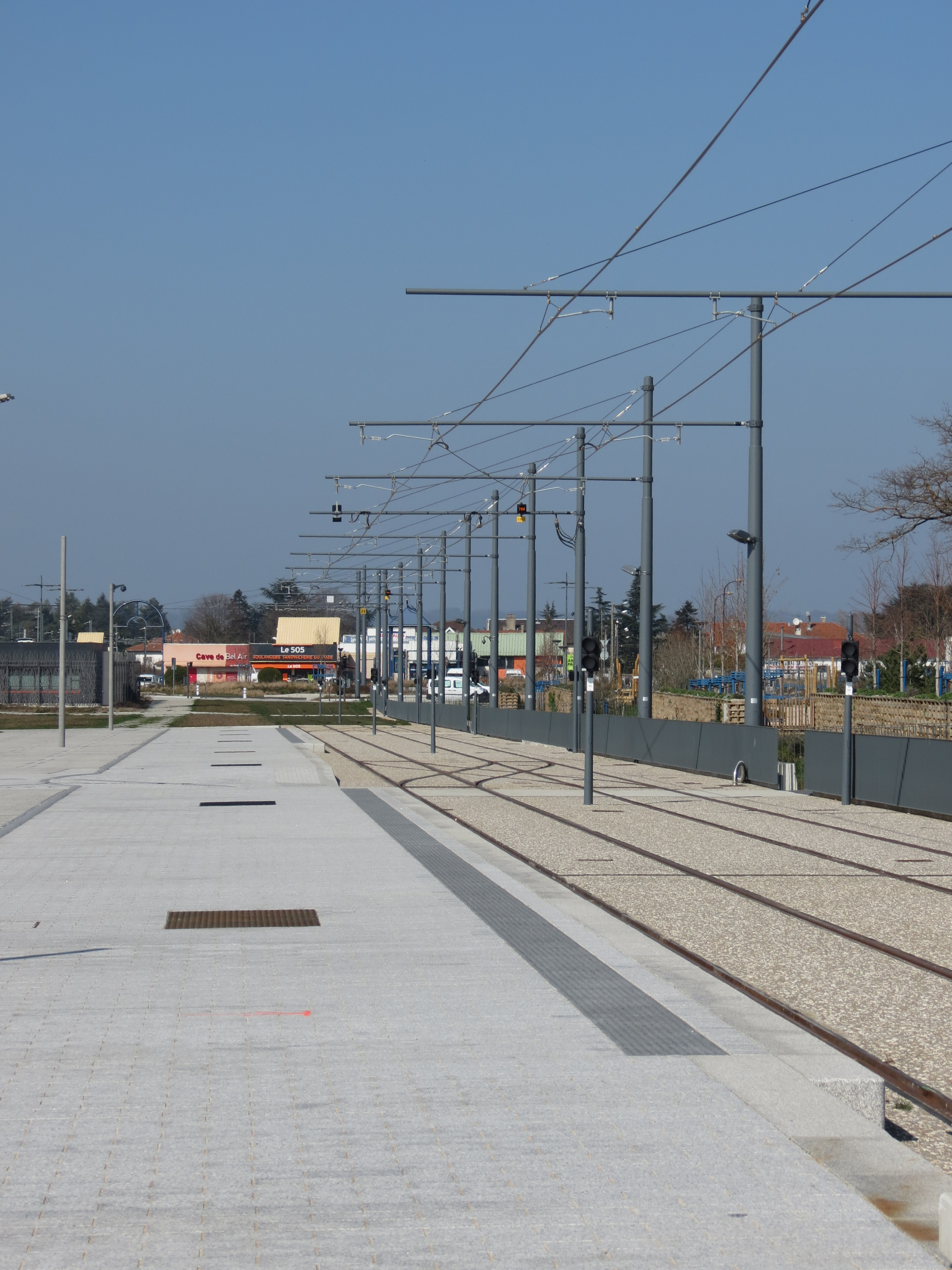 Terminus du tramway au stade des lumières de Lyon